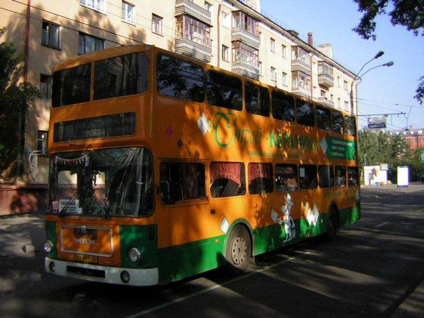 Двухэтажный MAN SD200